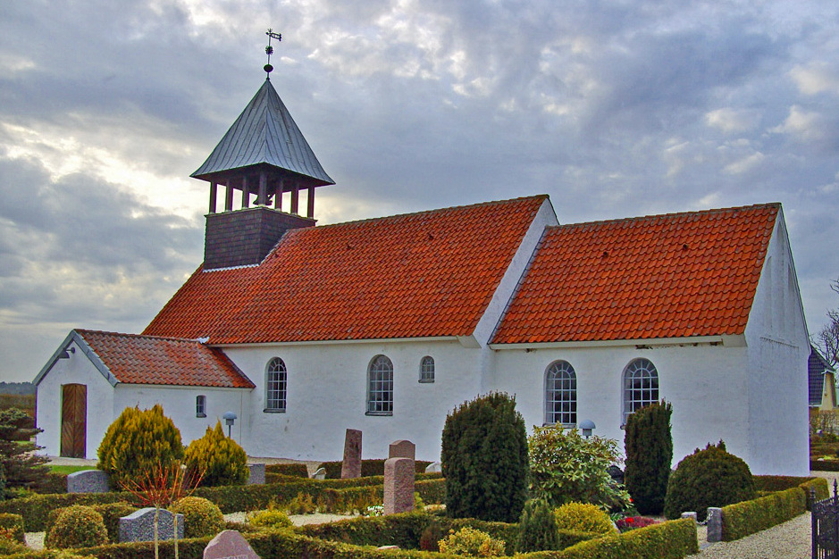 Ho kirke (jylland) fra sydøst